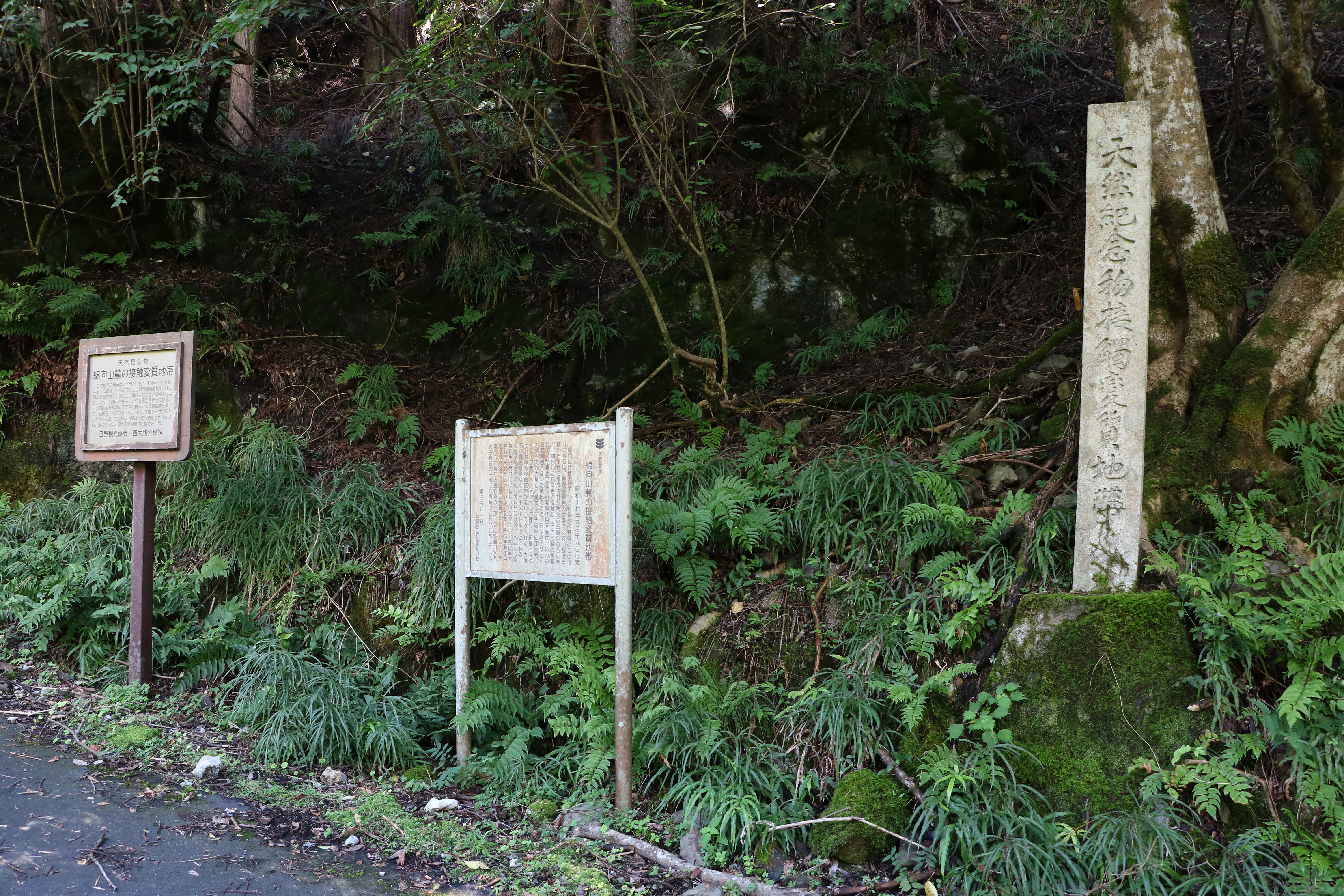 綿向山麓の接触変質地帯（国指定天然記念物、滋賀県蒲生郡日野町）天然記念物石碑。